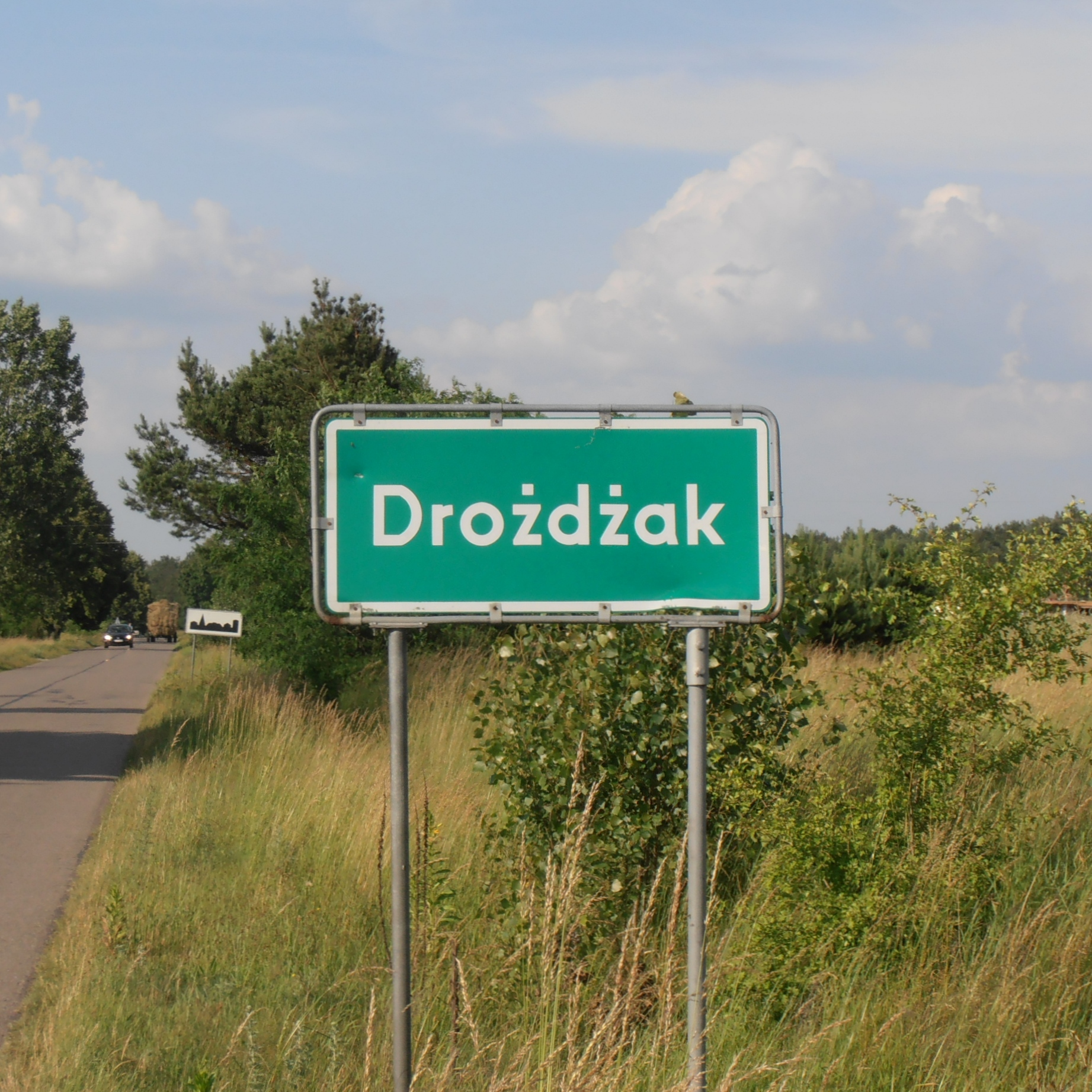 Gmina Krzywda (pow. łukowski, woj. lubelskie, Polska). Okolice wsi Drożdżak.